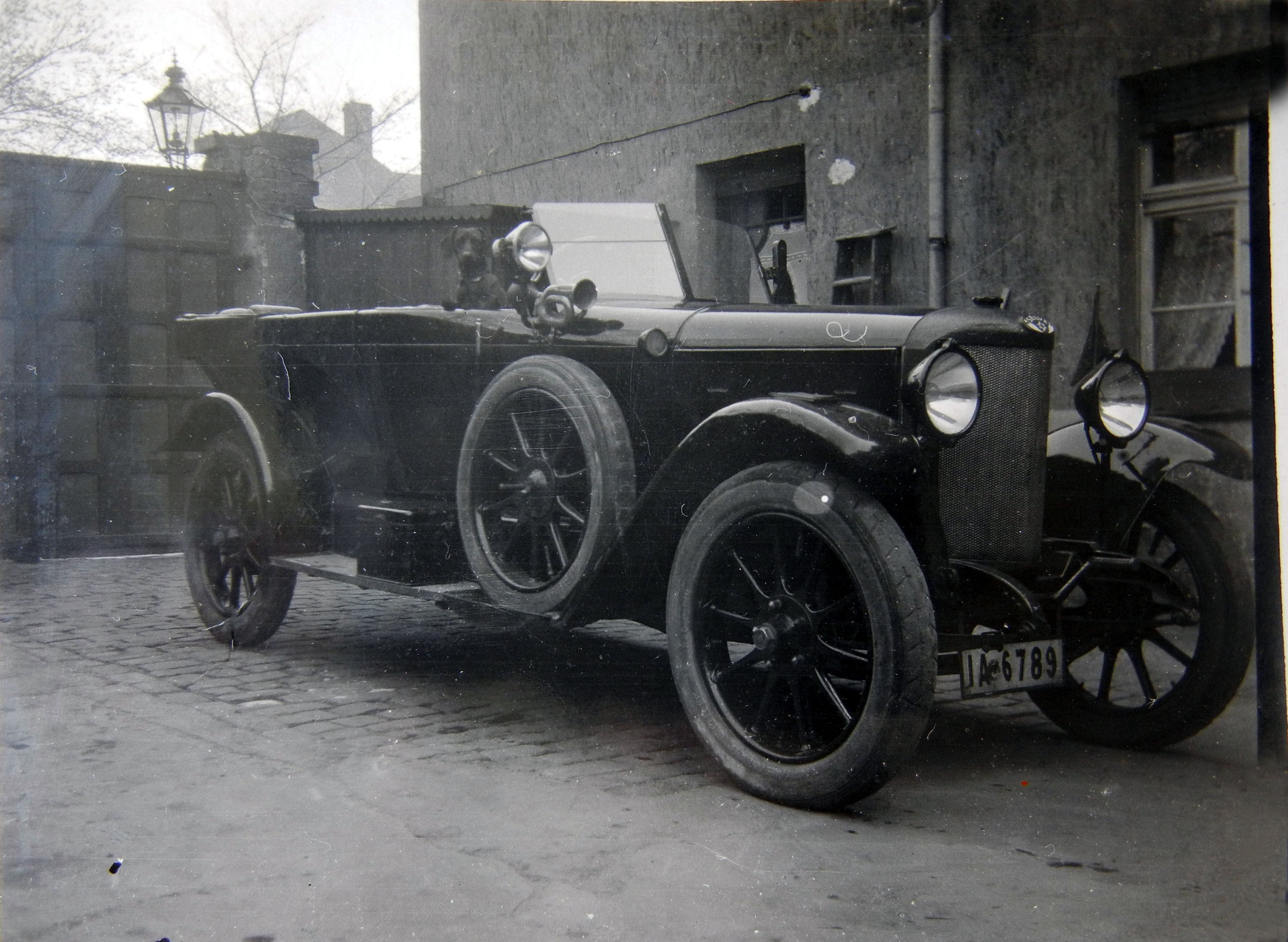 Selve Automobilwerke AG